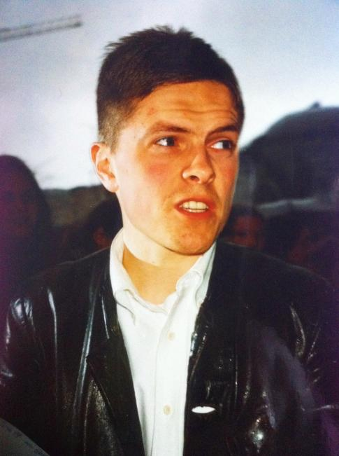 Paddy Kelly in Köln